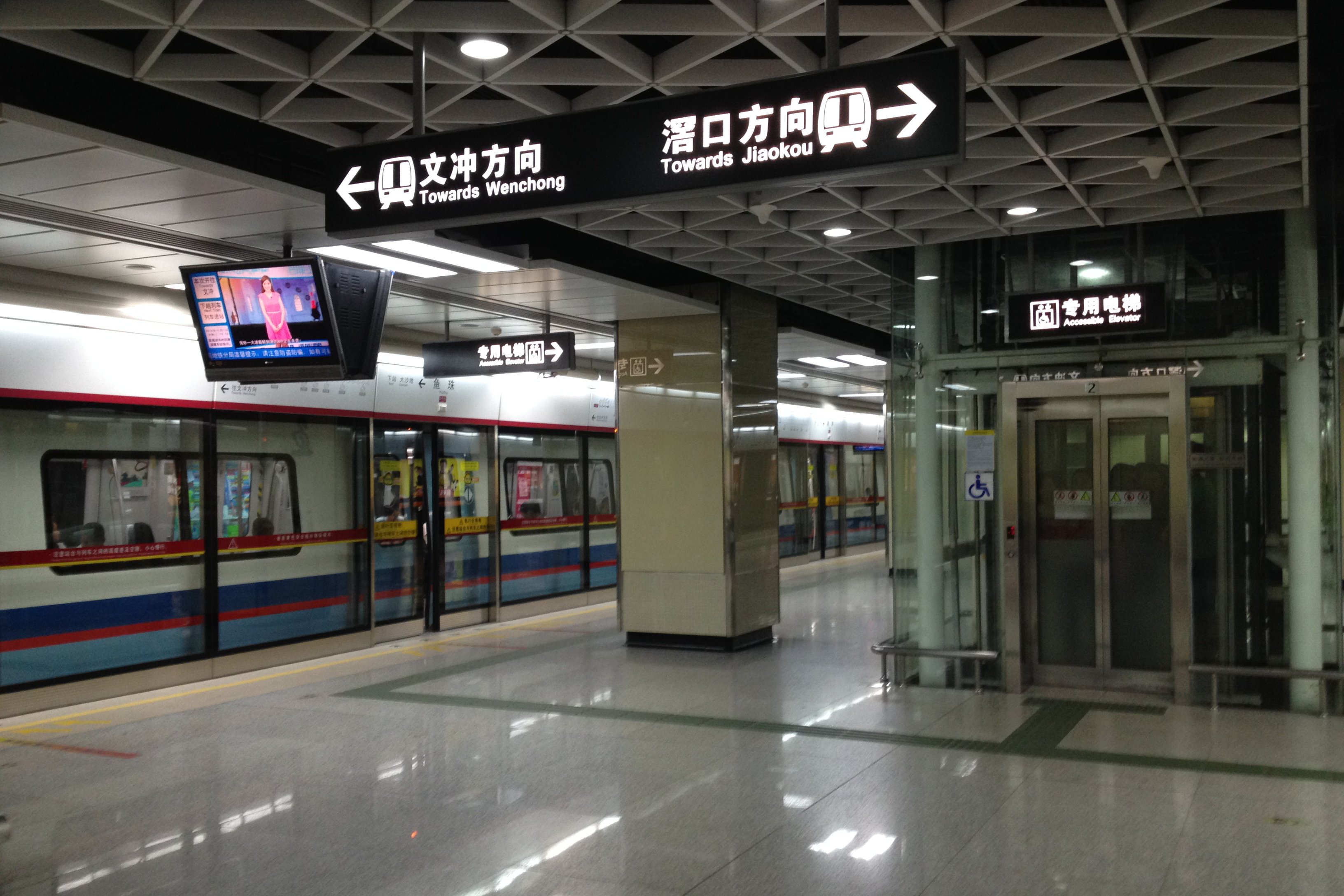 广州地铁5号线鱼珠站站台